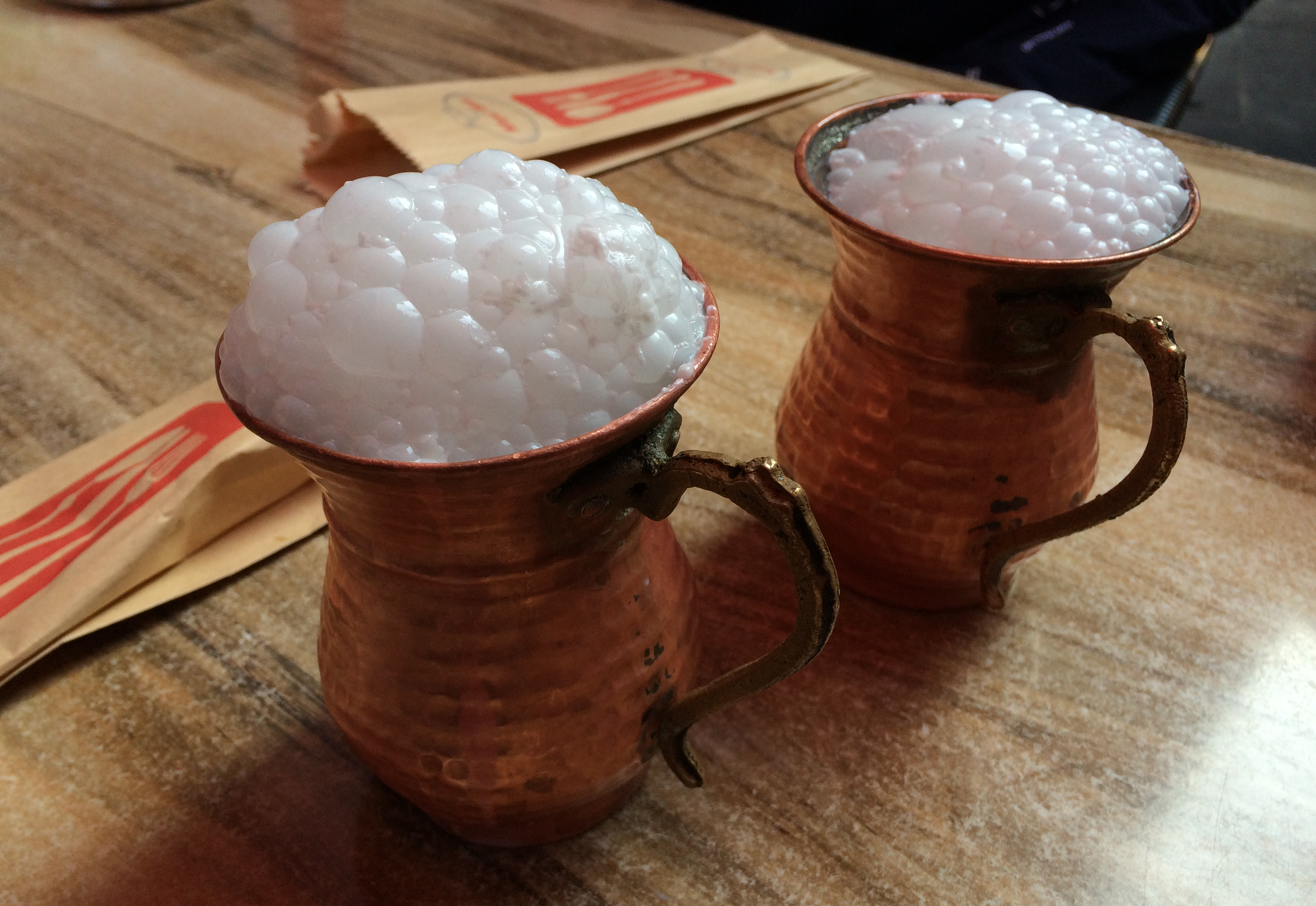 Bakır maşrapa içine konularak servis edilen ayran.